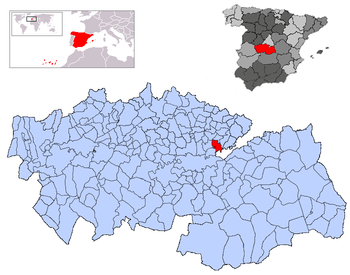 Villaseca de la Sagra en la provincia de Toledo